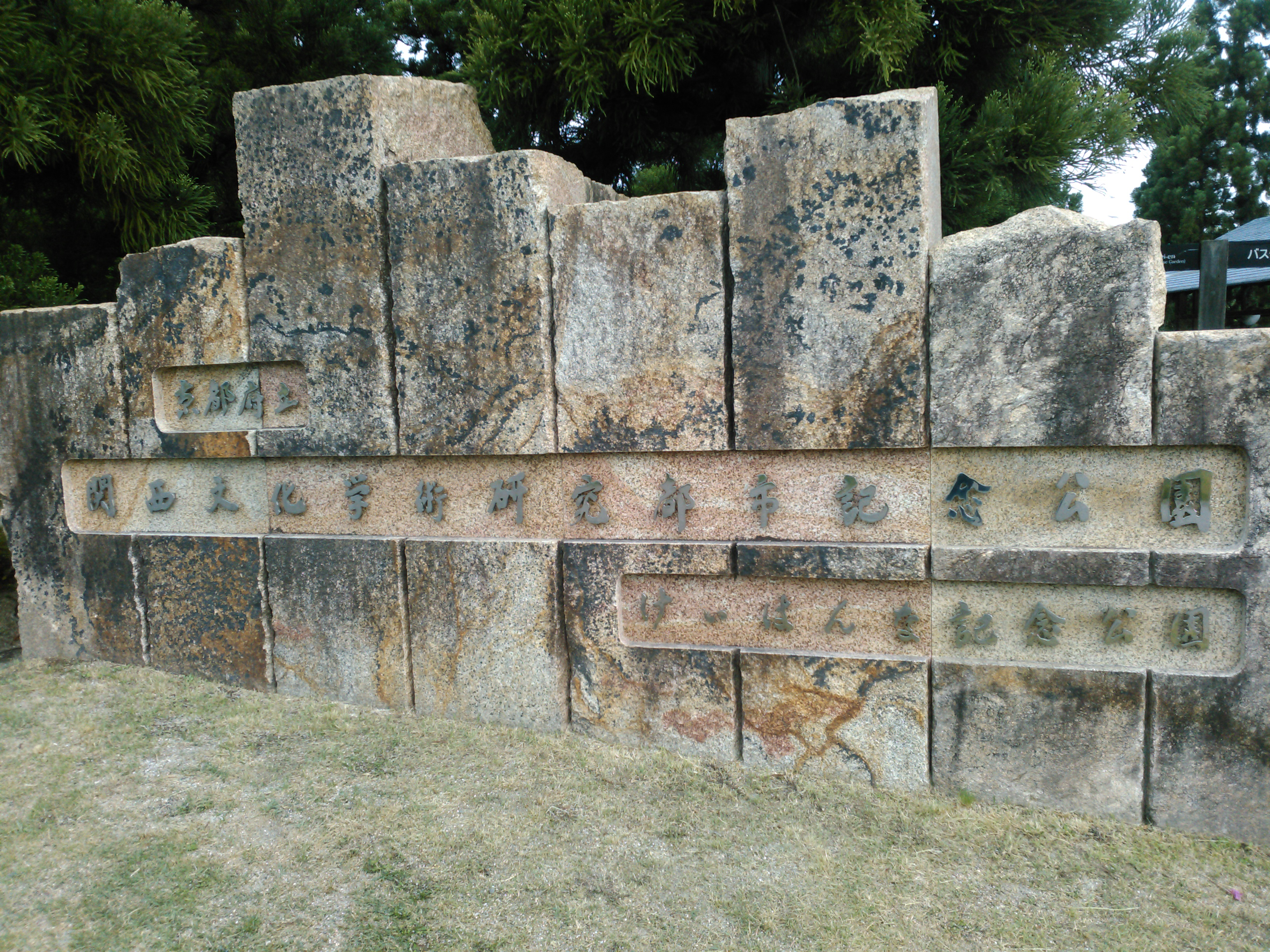 けいはんな記念公園入口石碑